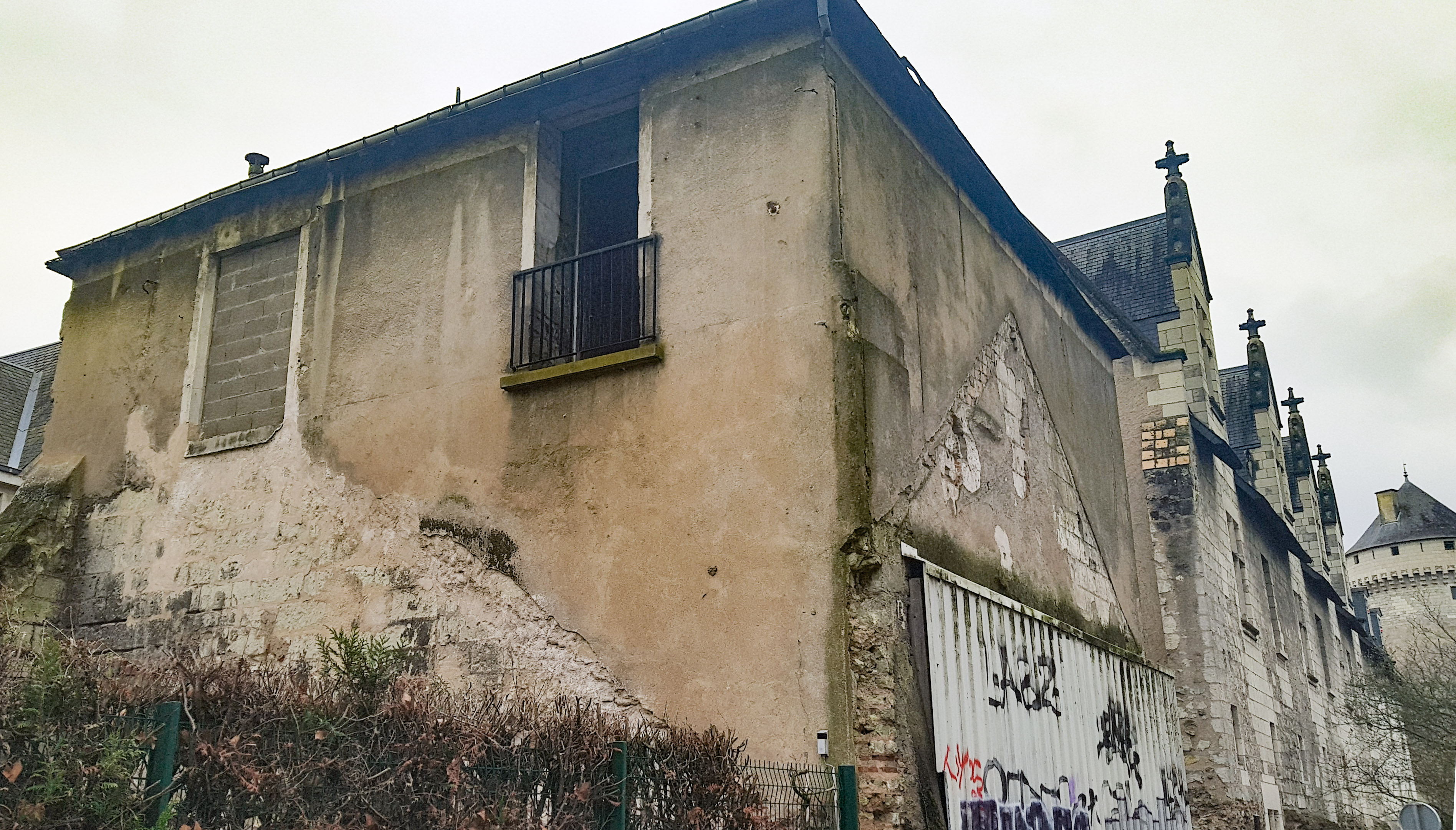 Vieux tours, Logis des gouverneurs XVe partie EST en partie en ruine